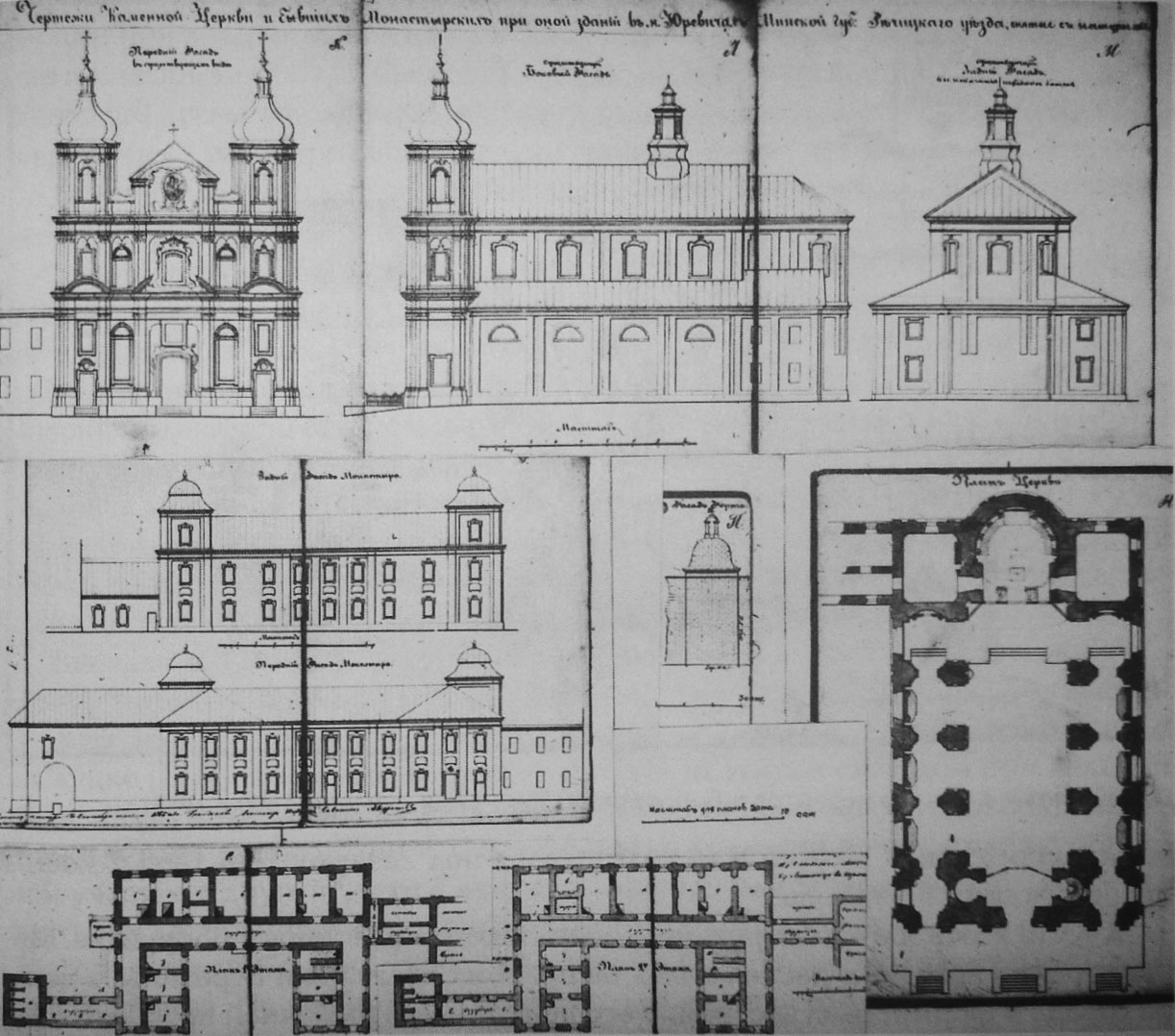 Беларуская (тарашкевіца): Юравічы (Juravičy). Езуіцкі калегіюм. Заходні (а); паўднёвы (б), усходні (в), фасады і плян касьцёла (г); усходні (д) і заходні (е) фасады кляштару. Пляны 1-га (ж) і 2-га (з) паверхаў кляштару. Фасад вежы агароджы (и), 1865.